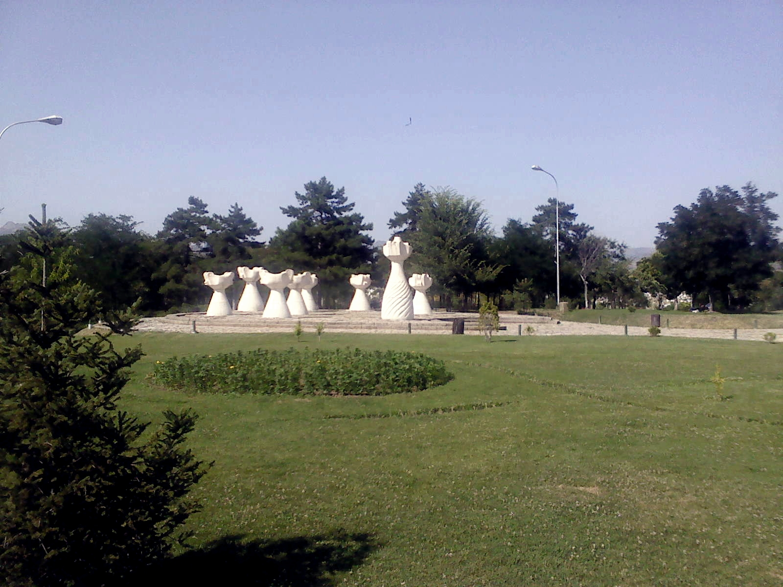 Прилеп Р. Македонија ( Могила на непобедените ) 2